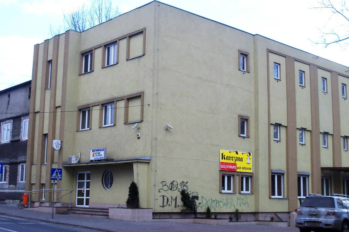 Budynek przy ul. gen. Józefa Hallera 71 w Katowicach-Dąbrówce Małej (dawniej budynek sceny "Capitol" Teatru "Ateneum")